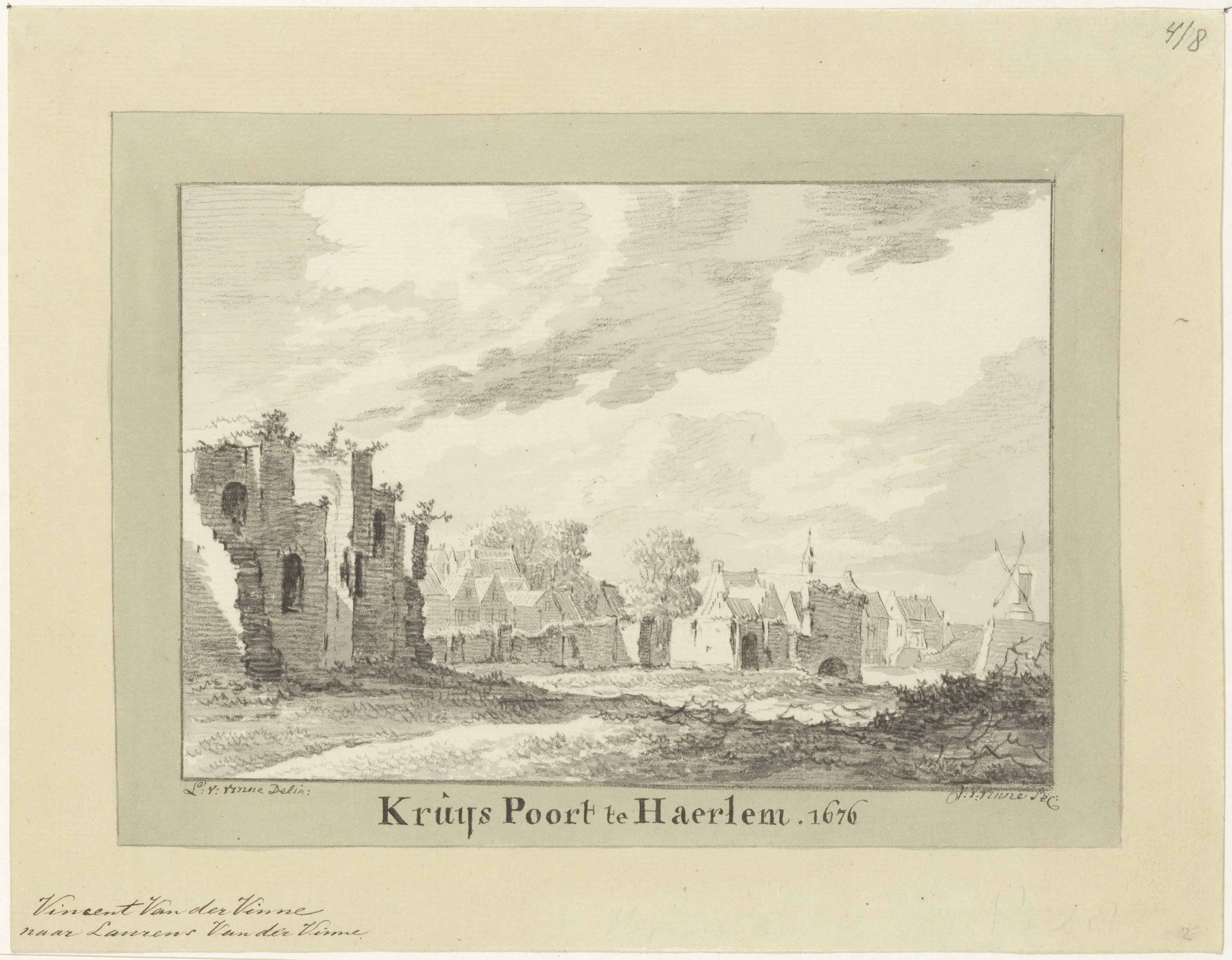 Copie door V.J.v.d.Vinne naar tekening van L.V.v.d.Vinne, waarschijnlijk 53-000140 K. Waarschijnlijk werd ca.1676 een begin gemaakt met de afbraak van de Kruispoort, doch pas na 1683 voltooid, immers nagenoeg identieke tekening van L.V.v.d.Vinne (53-000143 K) draagt het jaartal 1683. Oriëntatie: ziende naar het zuidwesten. Rechts van het midden de waterpoort over de v.m. Kraaienhorstergracht; daarachter de v.m. Magdalenakapel van het Arme Kinderhuis; links daarvan de huizen ter hoogte van de tegenwoordige Nassaustraat.